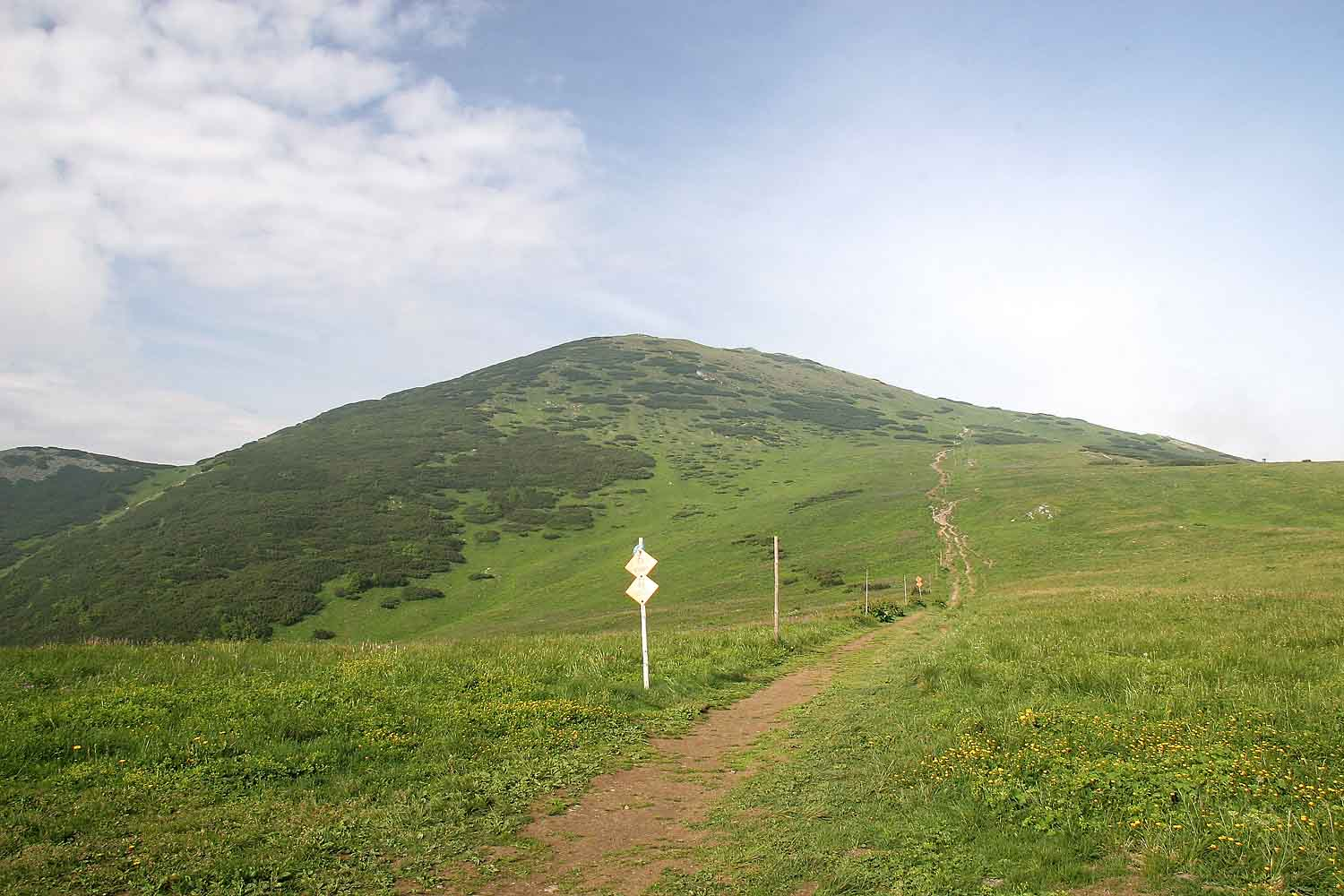 Velký Kriváň, view from gap Snielovské sedlo, Malá Fatra, district Žilina, Slovakia Autor:Prazak date: 29. 6. 2006